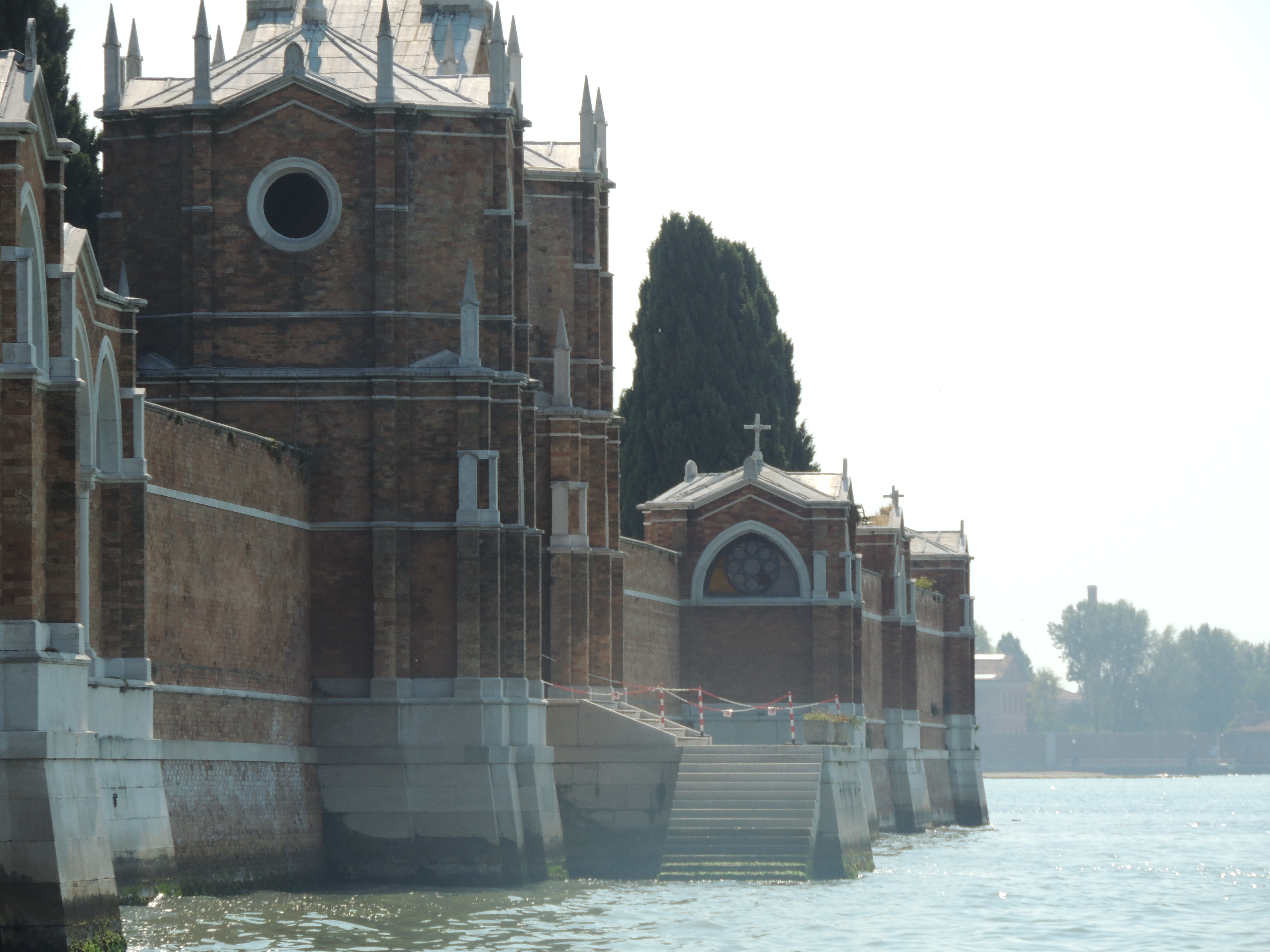 Cimitero di San Michele (Venice)